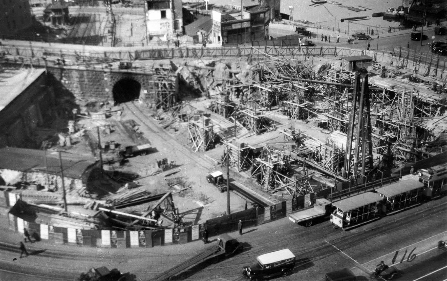 Ryssgården: Tunnelbanebygget 1930-34, bild tagen från Katarinahissen och rakt ner mot arbetsplatsen Slussen. Den tunnel man ser mynningen på nästan mitt i bilden är för godstrafiken till och från Söder Mälarstrand. Till vänster syns tunnelbanans Katarinatunnel (Södertunneln). Den provisoriska vändslingan som kommer ligga mitt på Ryssgården kommer senare tas bort och över en ny bro fortsätter spåret mot station Gamla stan, men då som tunnelbanetåg. (enligt Stockholmskällan). Foto från Katarinahissen 1932